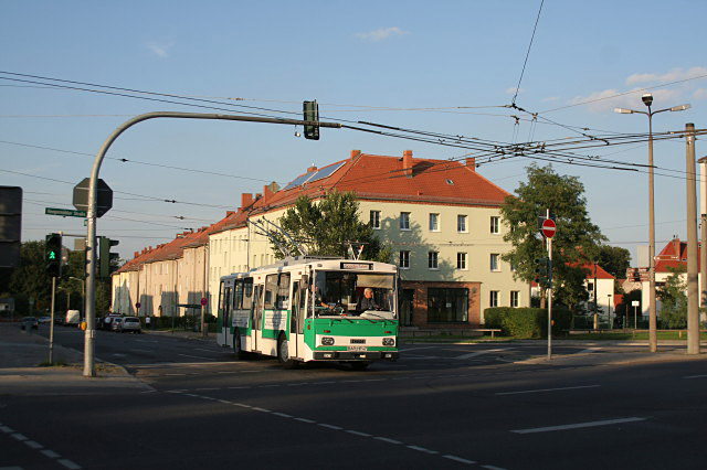 Obuswendeschleife Westend, 3 km from Eberswalde, Deutschland (Zone 33).